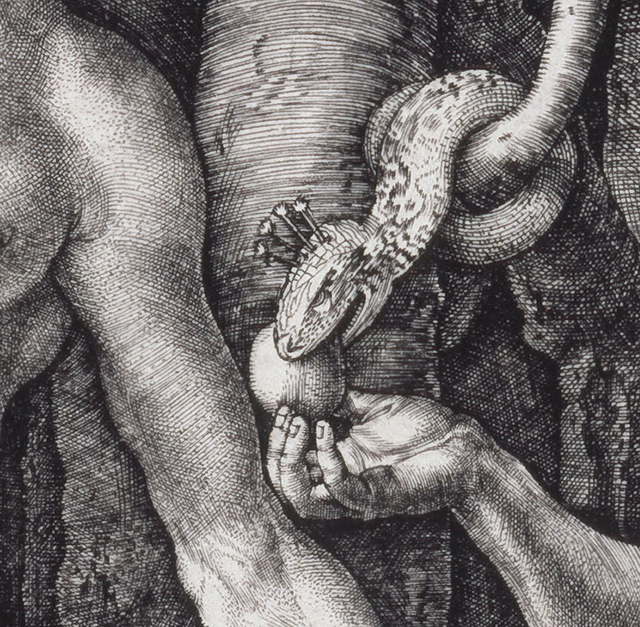 Ausschnitt aus Albrecht Dürers Grafik Der Sündenfall: Die Schlange überreicht Eva die verbotene Frucht.